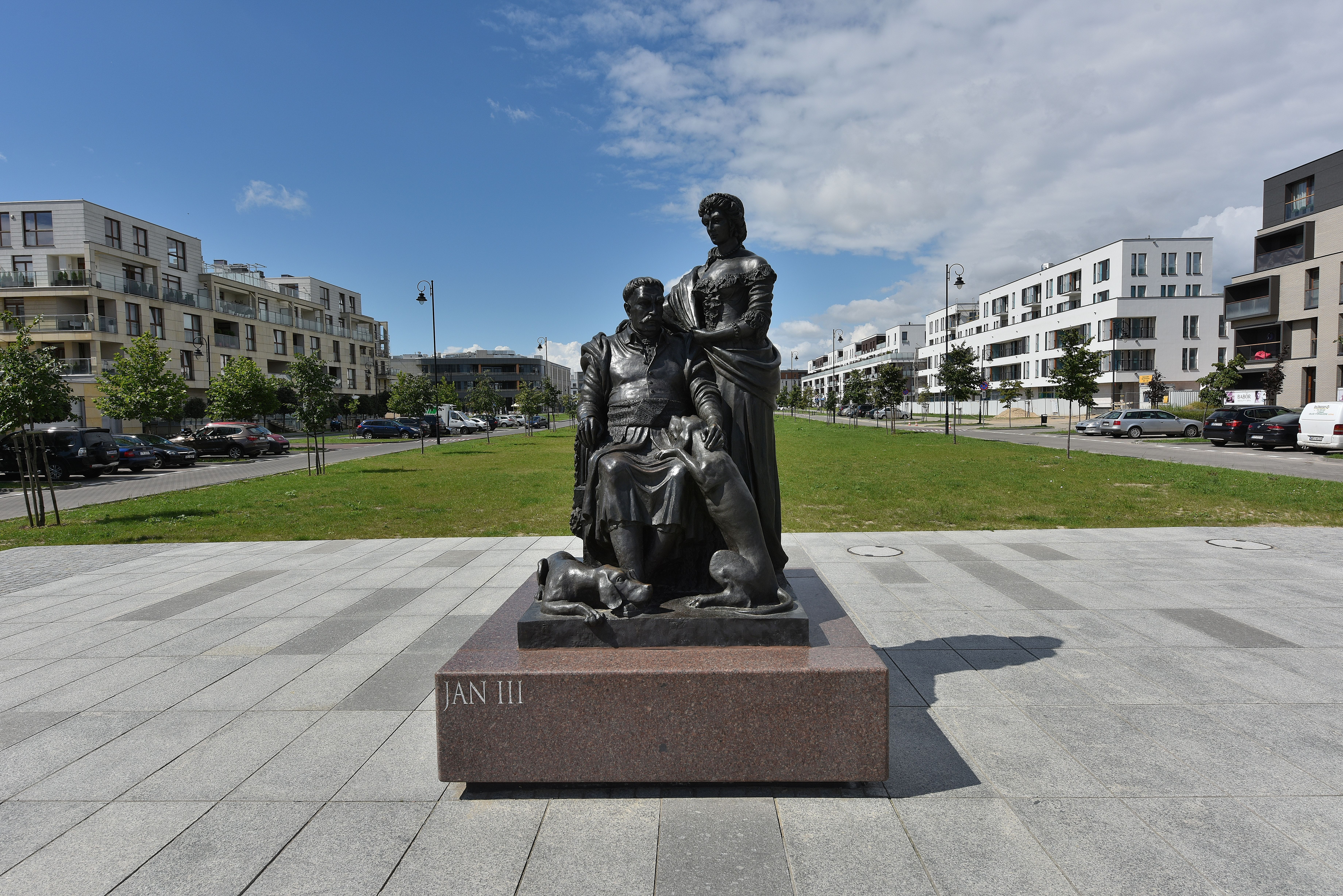 Pomnik Jana III Sobieskiego w Wilanowie